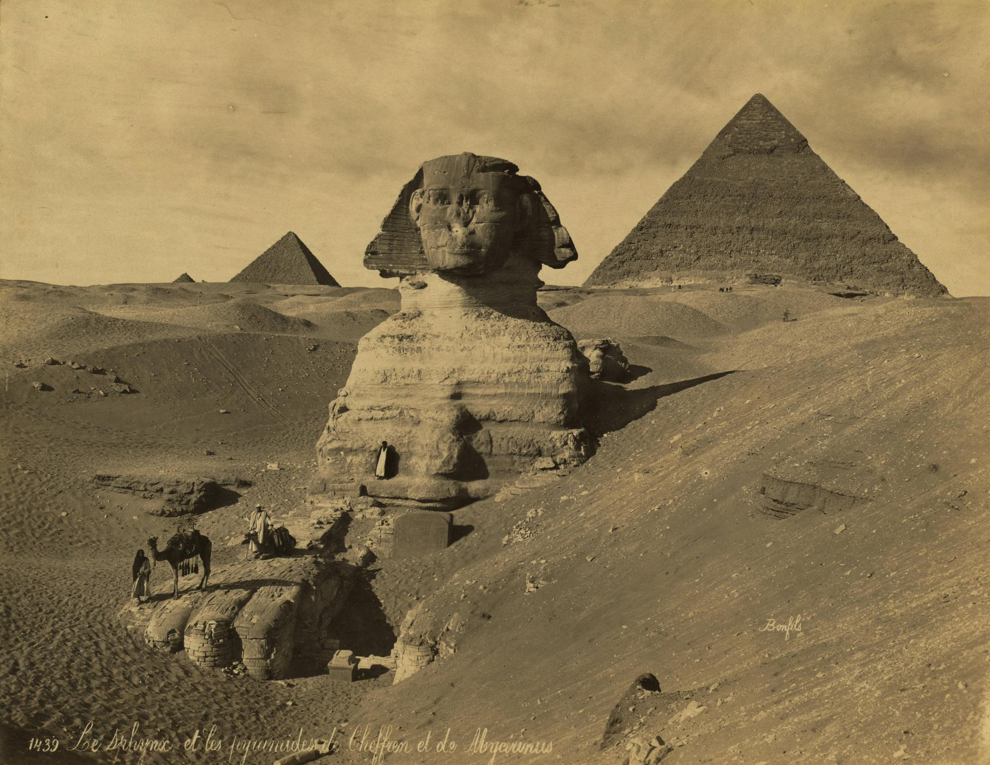 "1439 Le Sphynx et les pyramides de Cheffren et de Mycérinus. Bonfils"